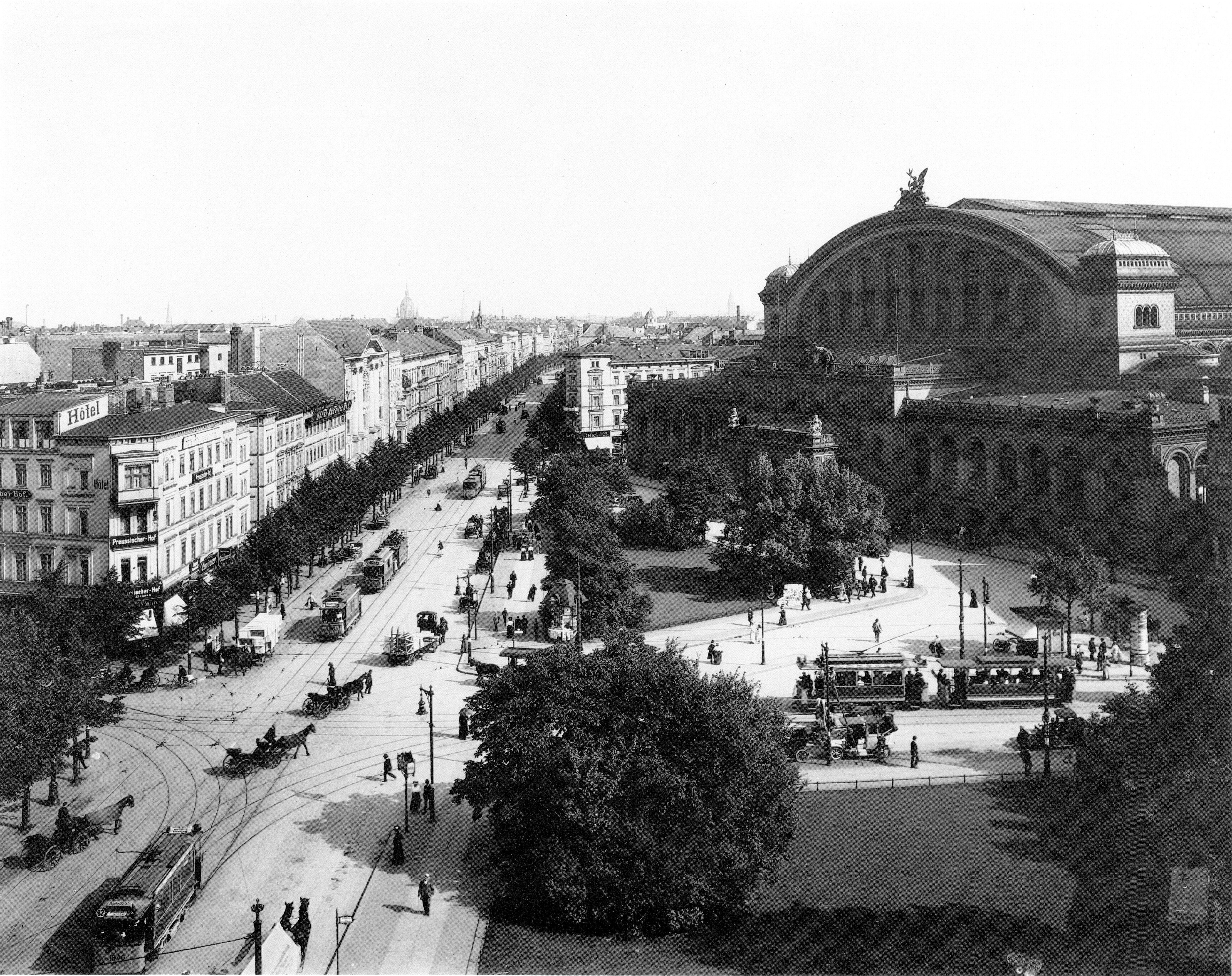 Berlin. Anhalter Bahnhof und Askanischer Platz. Links die heutige Stresemannstraße.